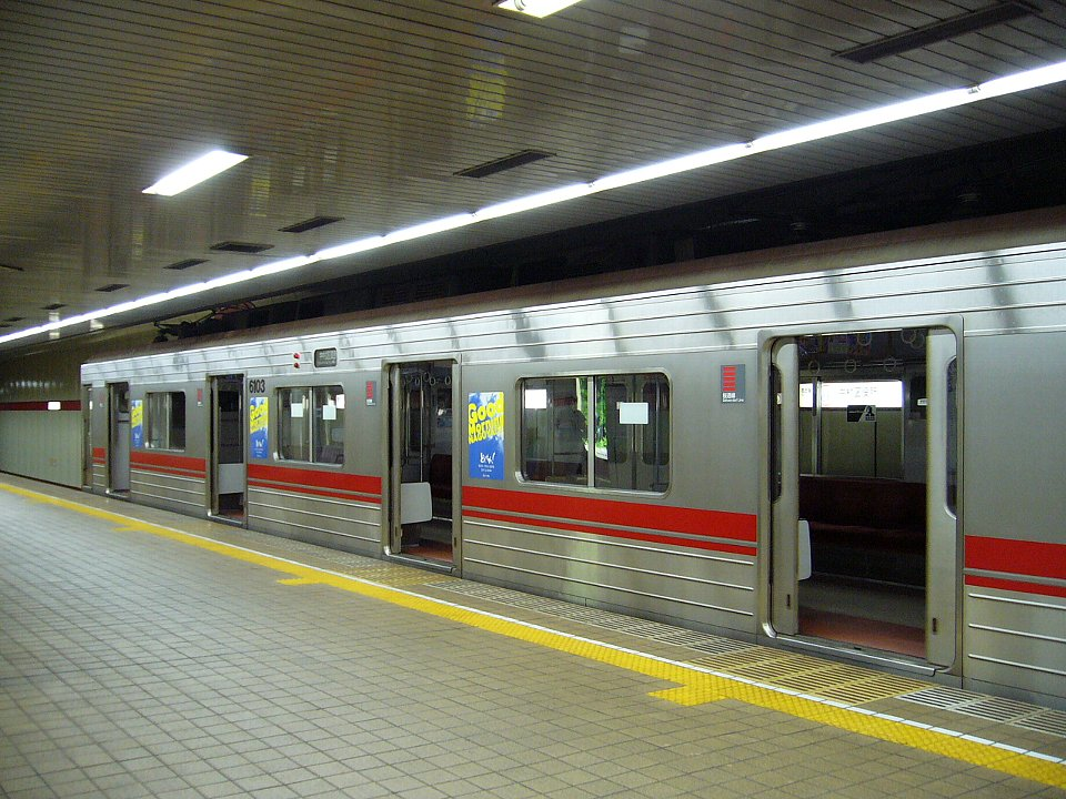 中村区役所駅に停車中の名古屋市交通局6000形回送車